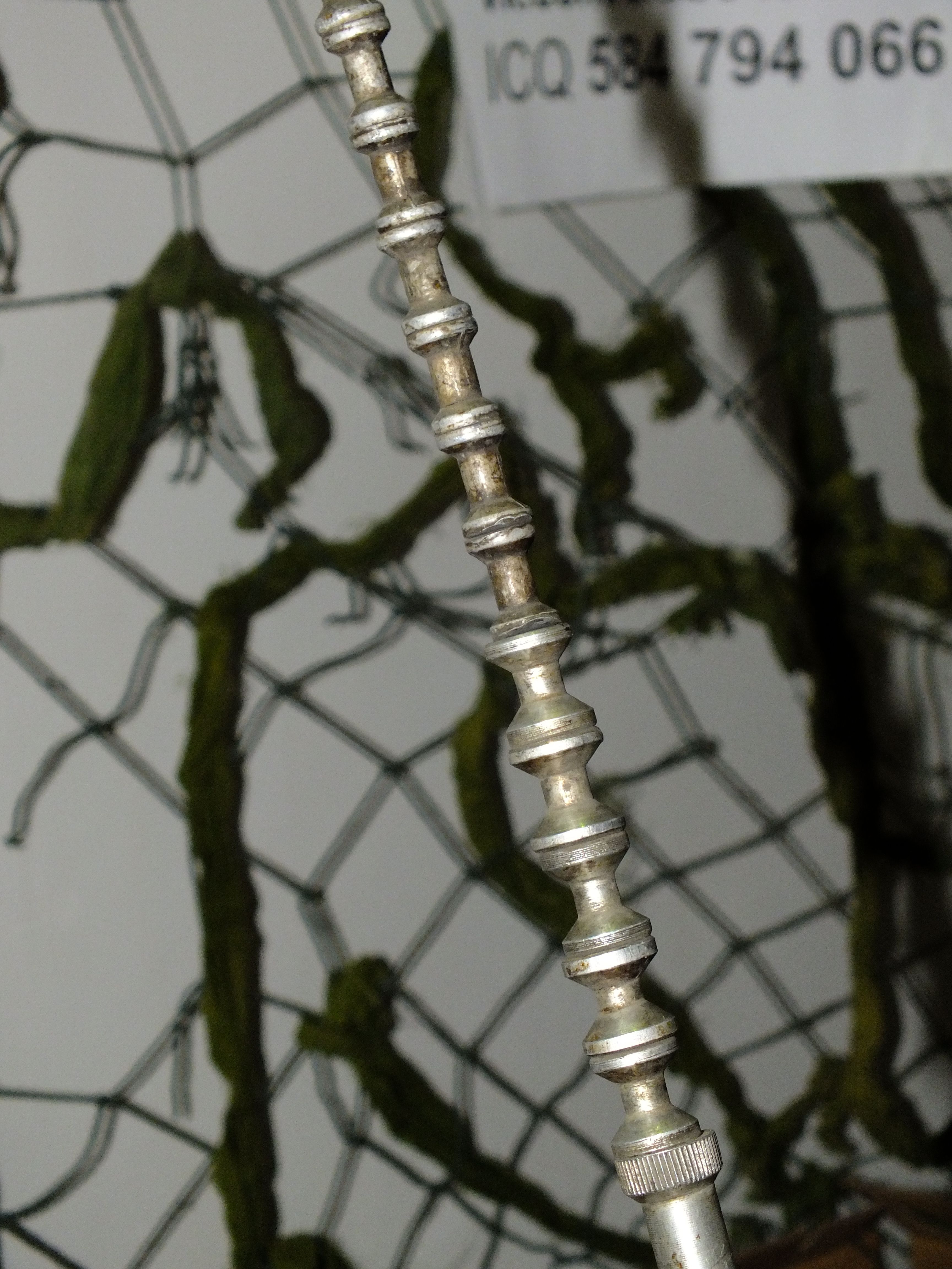 Радиостанция на выставке Хабаровск сентябрь 2015